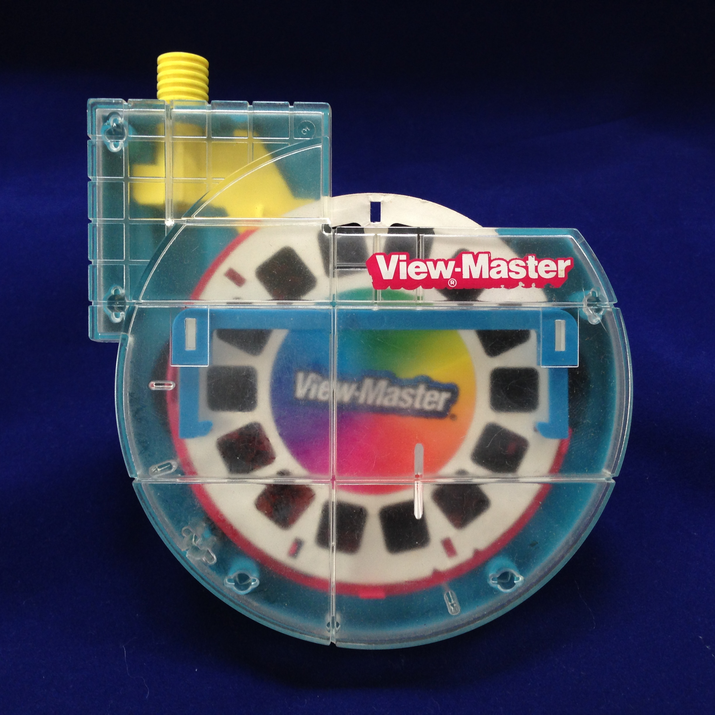 วิว-มาสเตอร์ โมเดล เอ็ม ฝาหลังใส และเป็นรุ่นเดียวที่เปลี่ยนภาพด้วยการกดปุ่มสีเหลือง